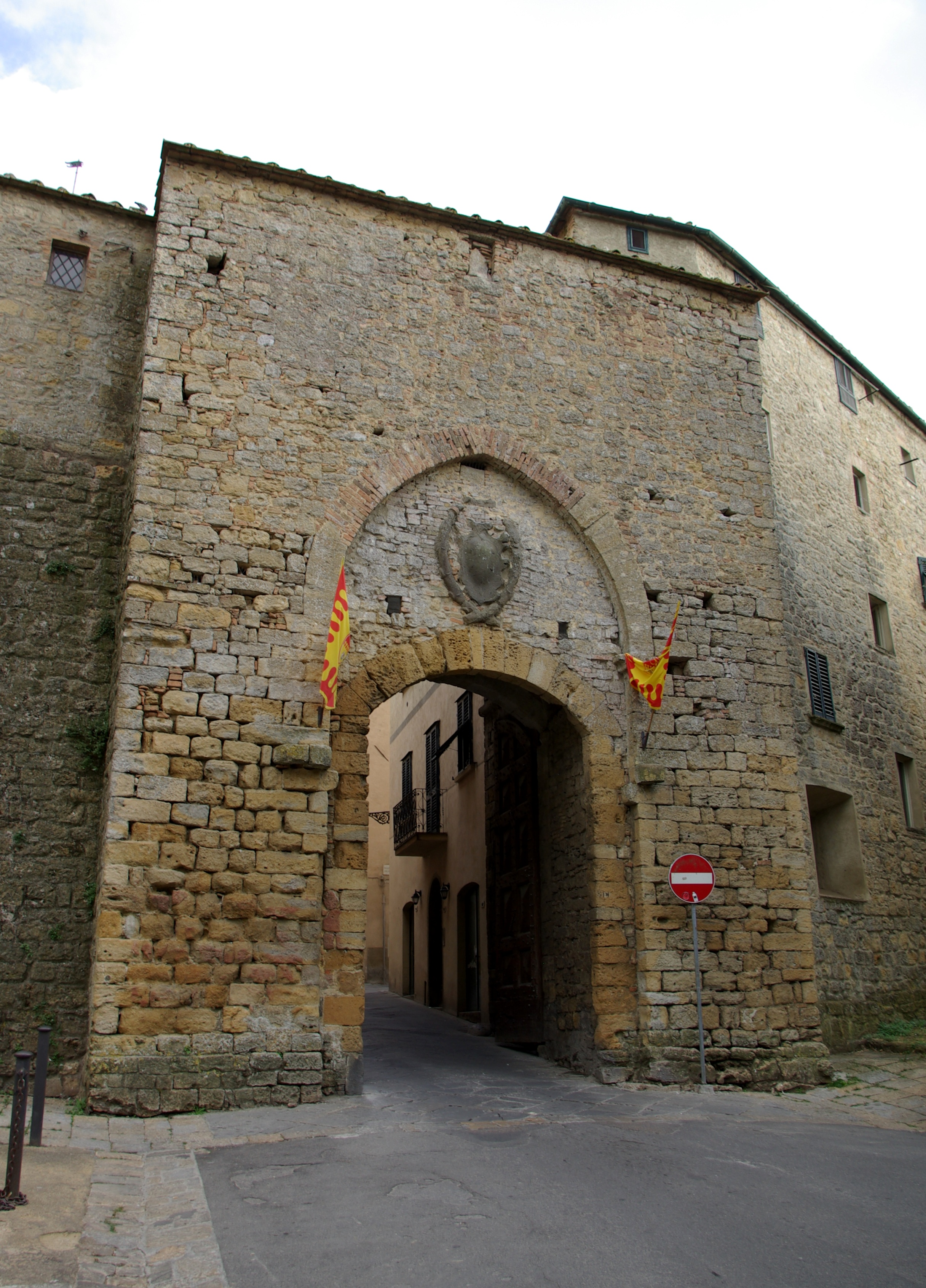 Porta Fiorentina (1543) in Volterra